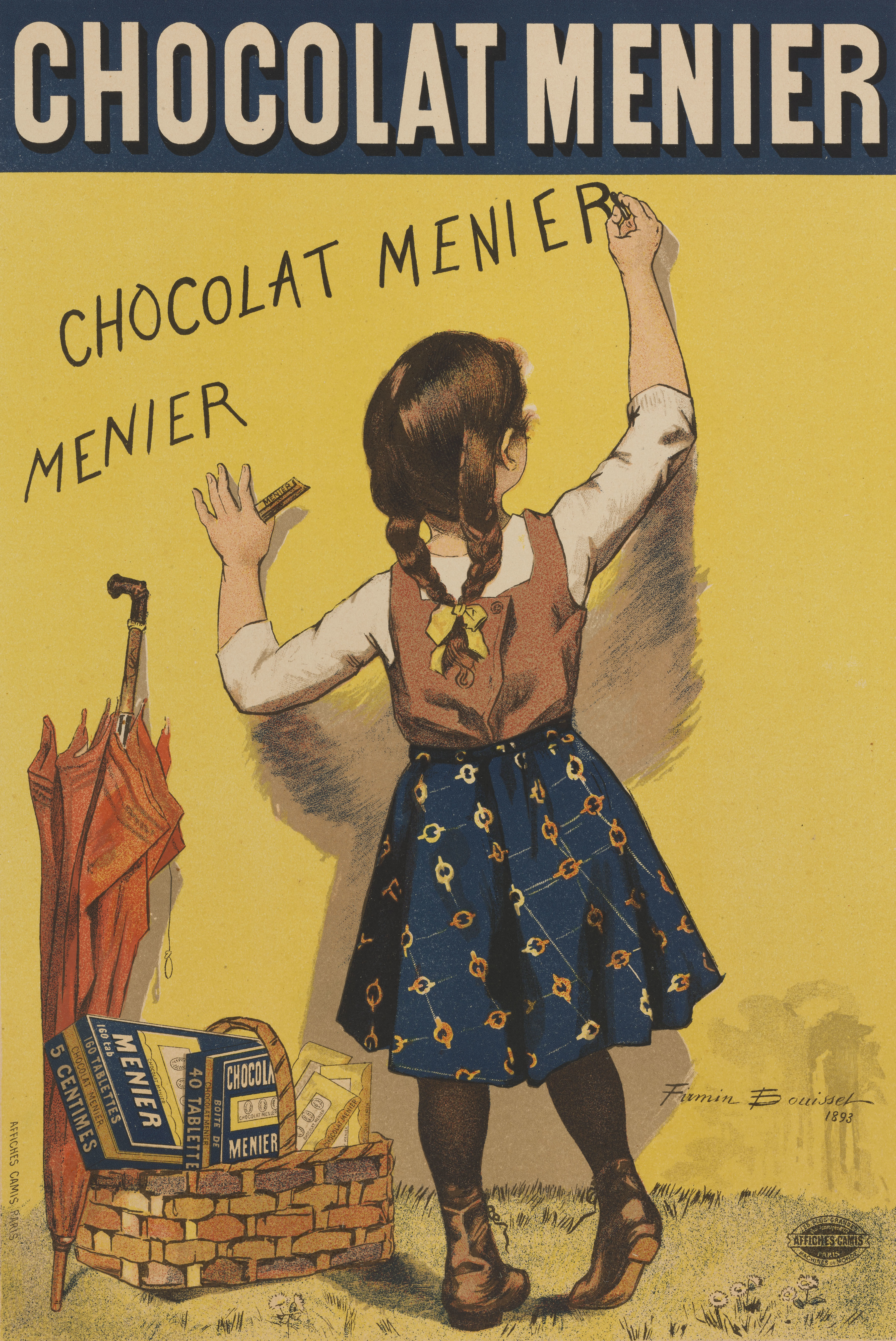 Planche 47 du Les Maîtres de l'Affiche : publication mensuelle contenant la reproduction des plus belles affiches illustrées des grands artistes, français et étrangers, éditée par L'Imprimerie Chaix, Premier Volume, Paris, 1896..